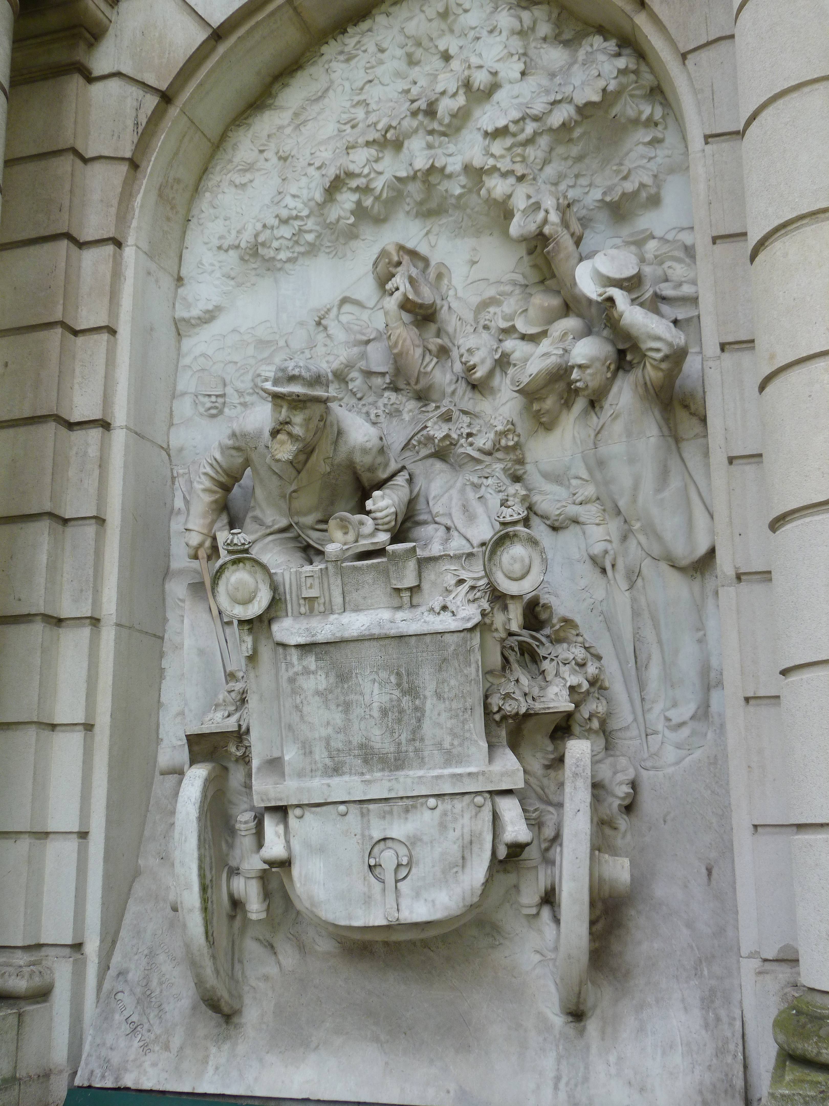 Monument à Émile Levassor, dit aussi Monument à l'Automobiliste, marbre (1907) dans le square Alexandre-et-René-Parodi (Paris 16e arrond), sculpté par Camille Lefèvre d'après l'esquisse de Jules Dalou. Vue de droite.